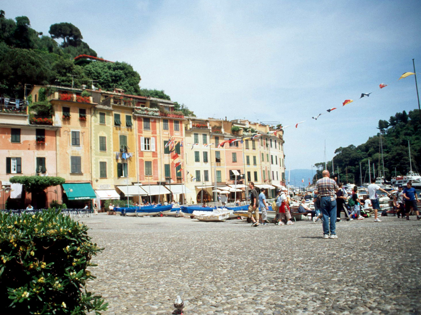 Portofino 2004